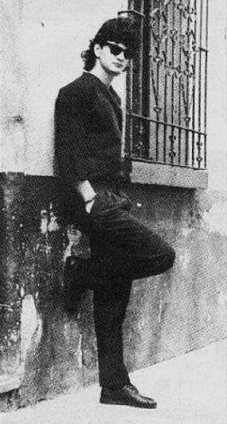 Ricardo Arjona en su juevntud